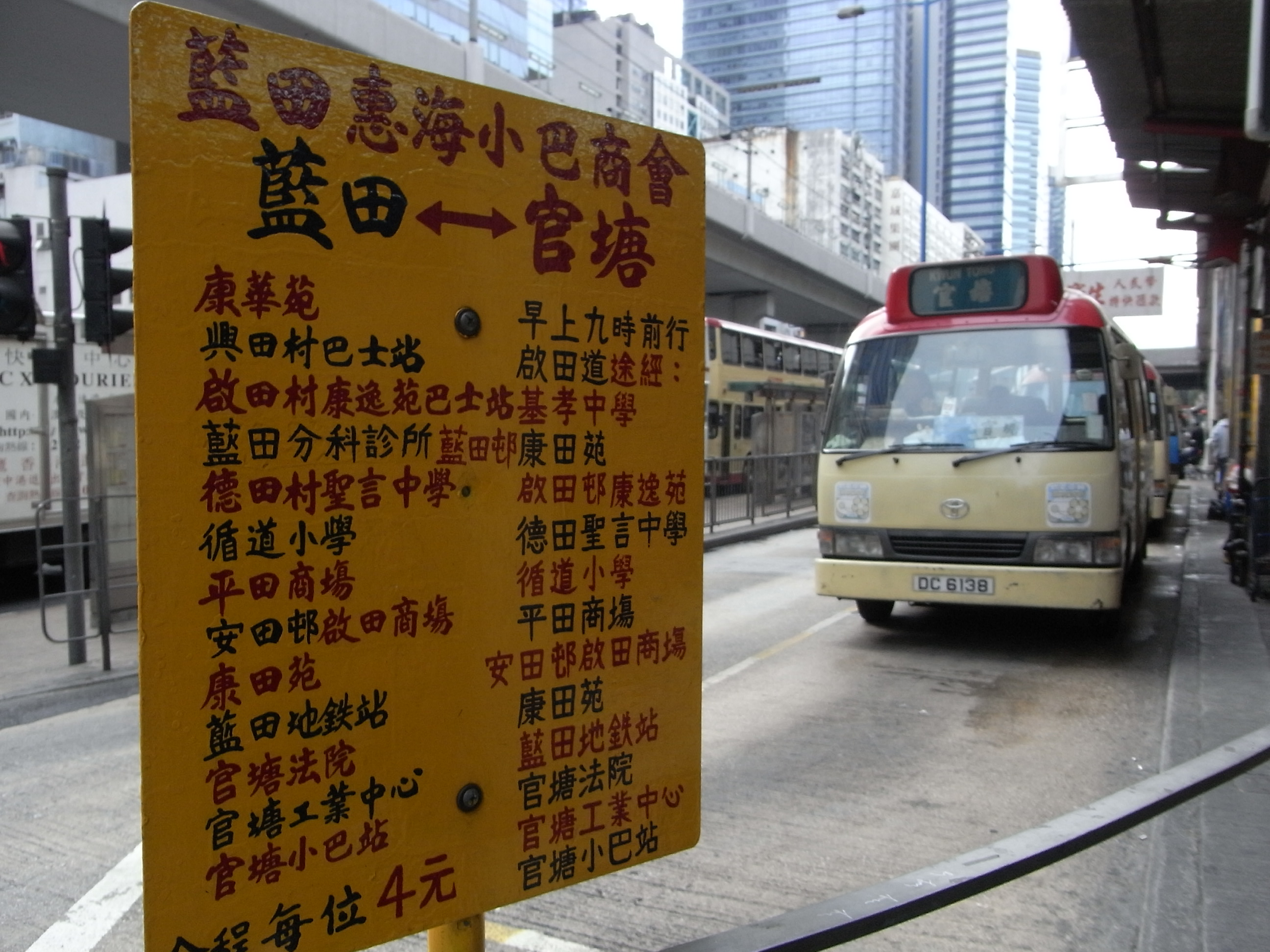 觀塘紅色小巴站